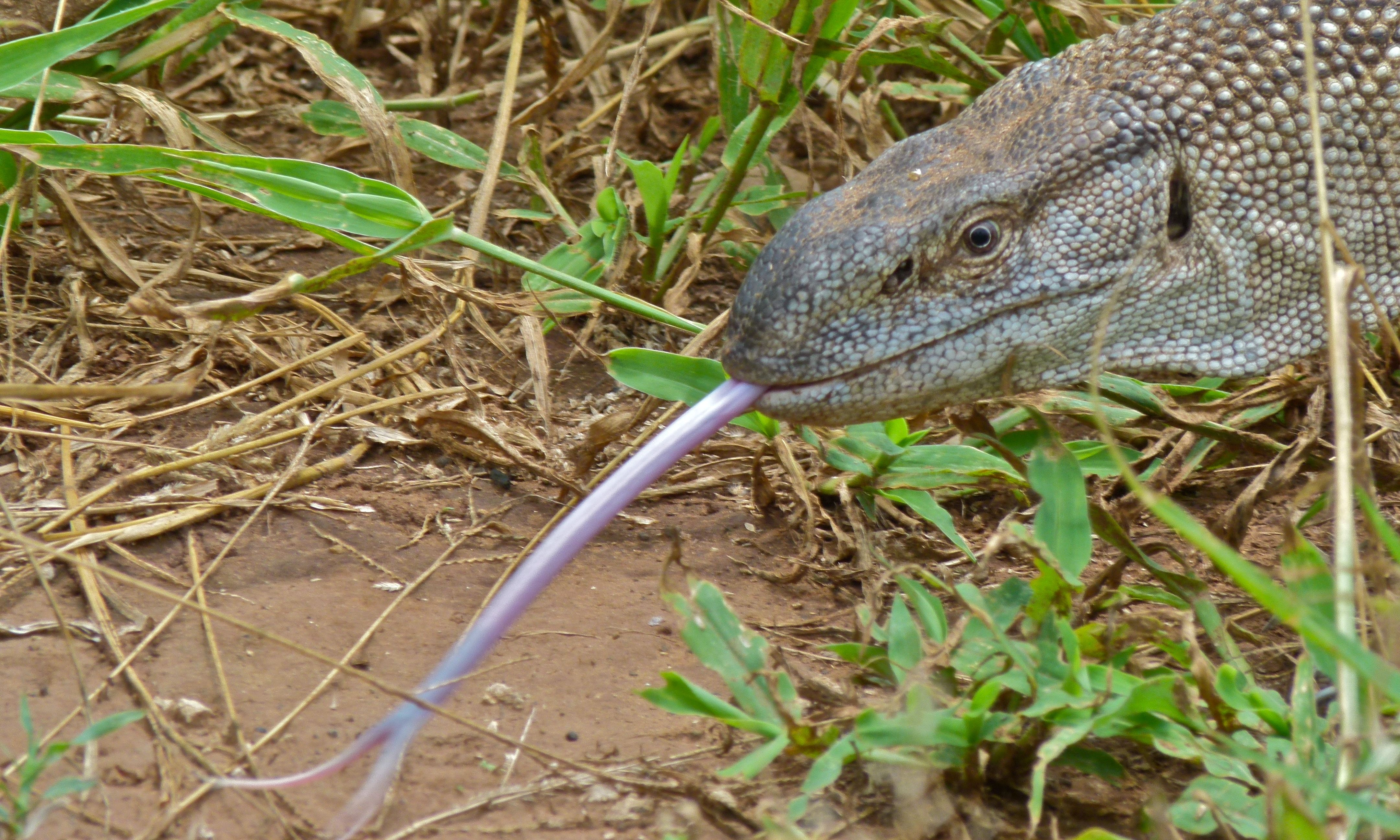 S63 near Pafuri, Kruger NP, SOUTH AFRICA